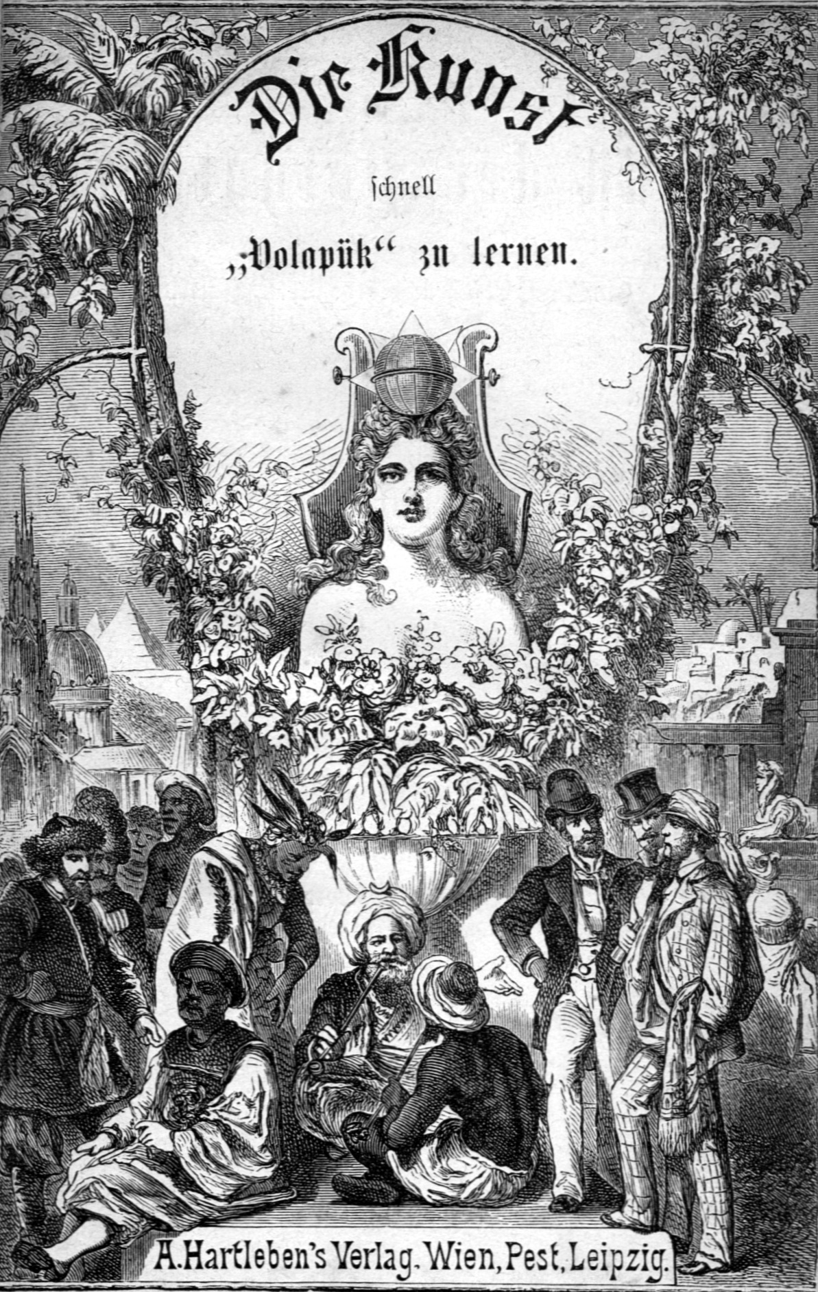 Frontispicio del libro Die Kunst die internationale Verkehrssprache ,,VOLAPÜK" schnell zu erlernen. Sale una alegoría de hombres de las diferentes razas hablando entre sí en volapük.